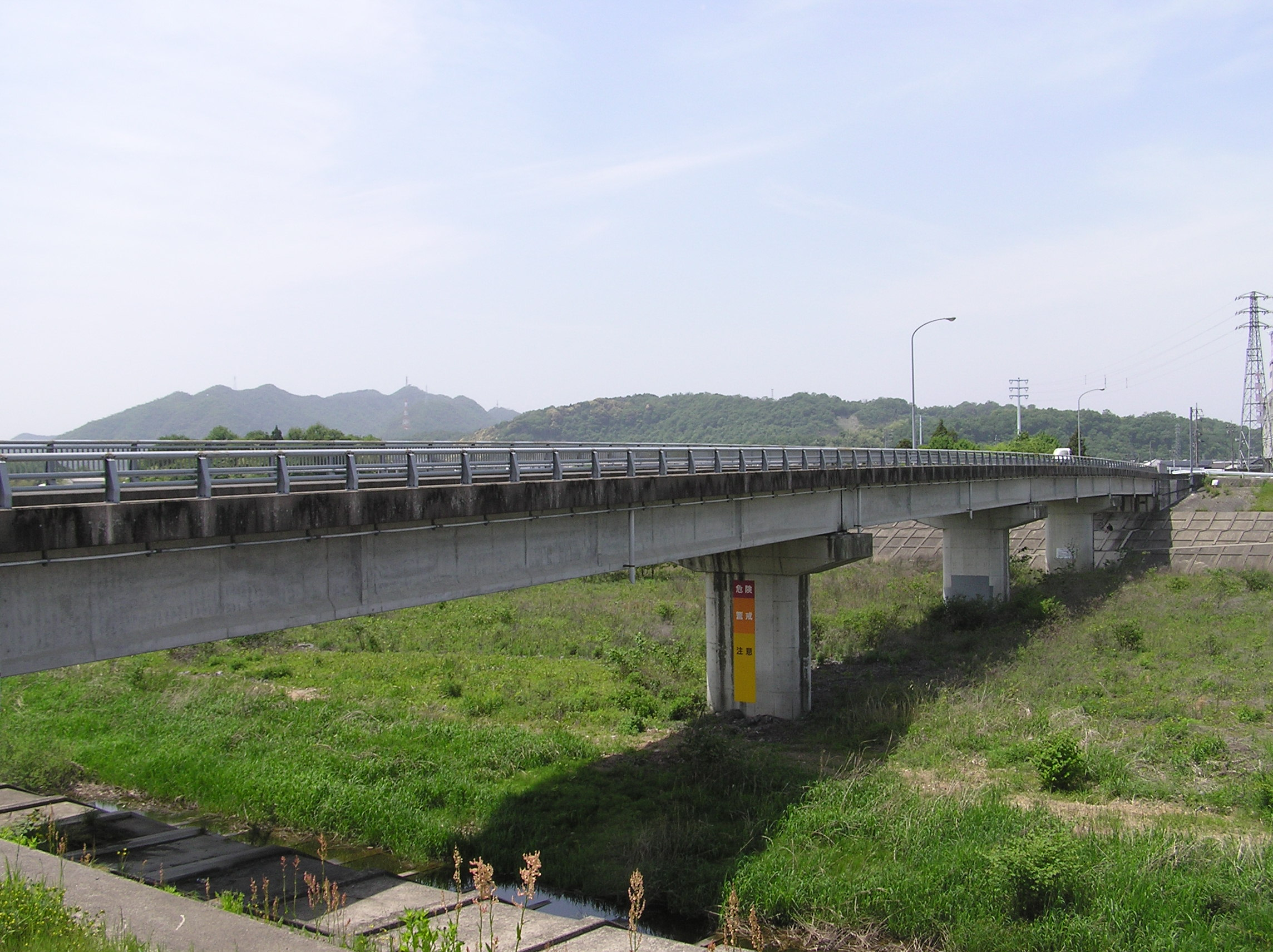 一色大橋（岐阜県加茂郡坂祝町）